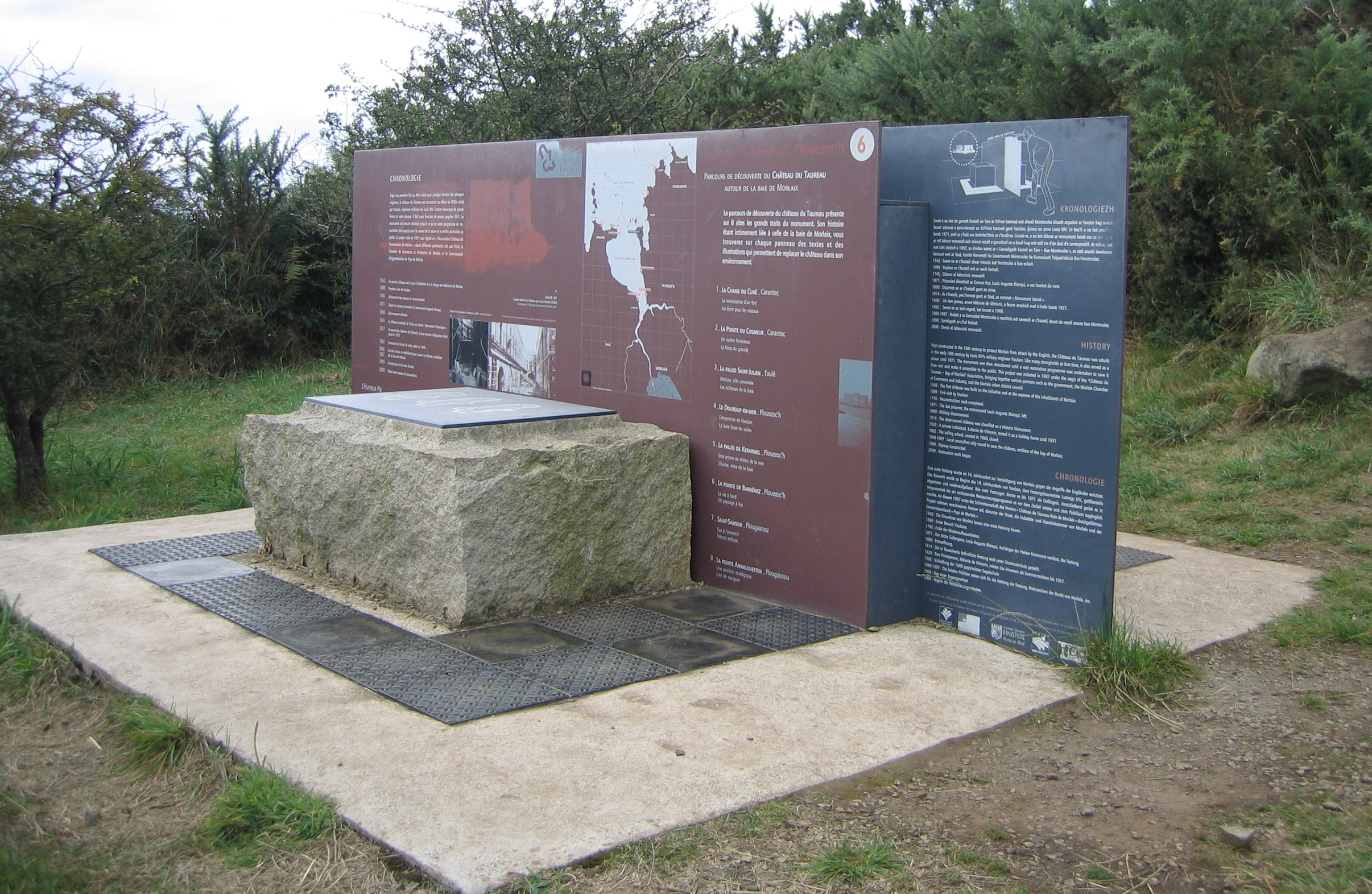 Point d'observation du château du Taureau, France